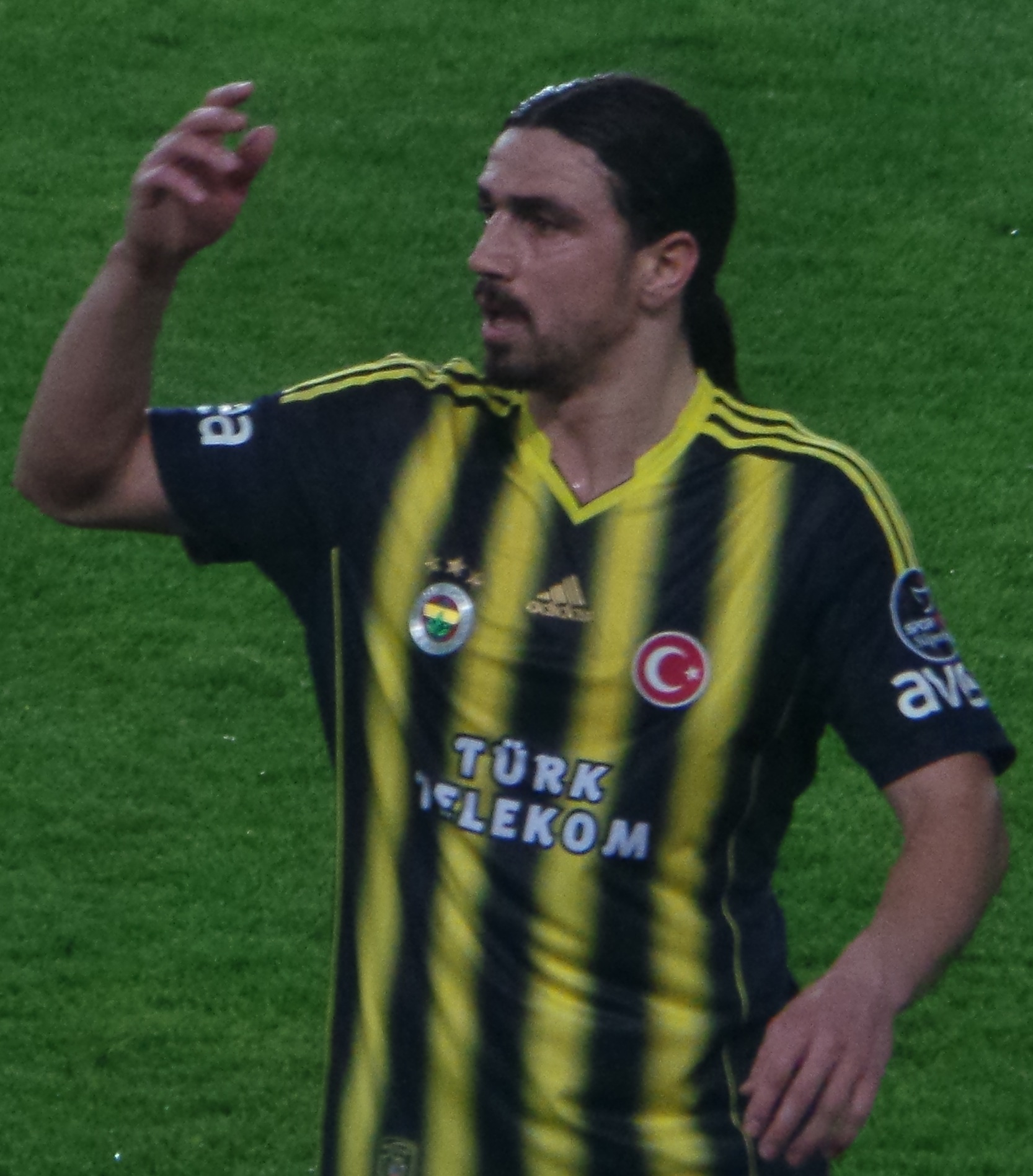 Mehmet Topuz'14